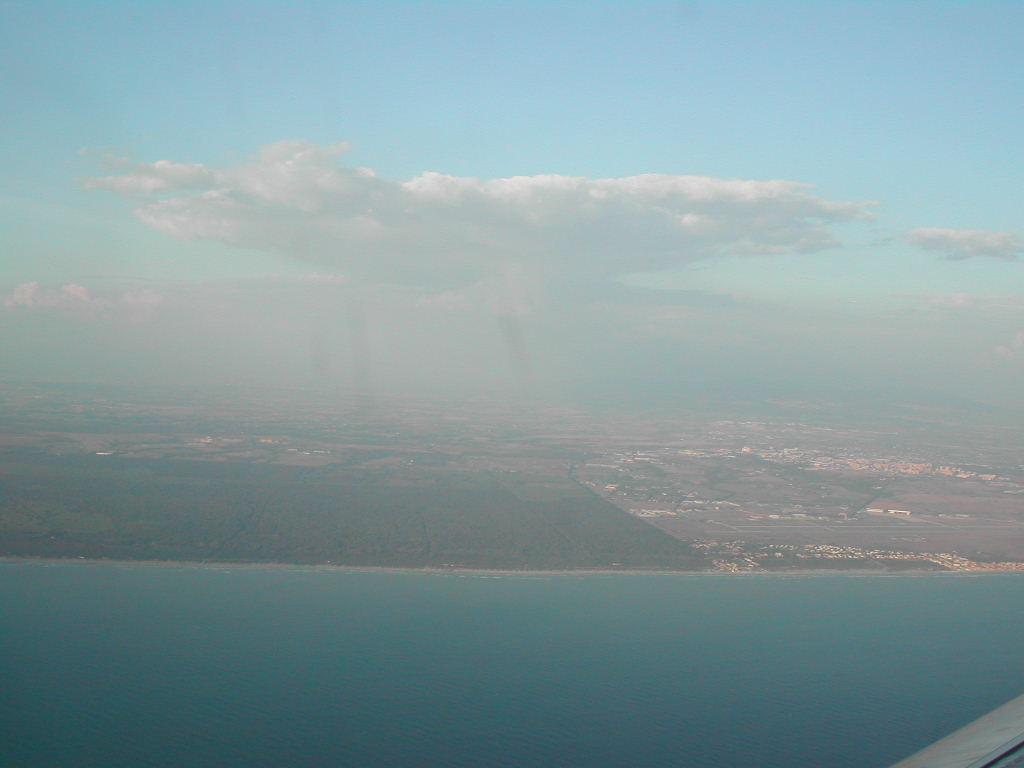 Roma, Pineta di Castel Porziano dall'aereo